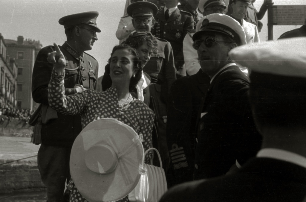 Título original: Francisco Franco en el embarcadero del Club Naútico acompañado de diversas autoridades (5/8) Localización: San Sebastián (Guipúzcoa)